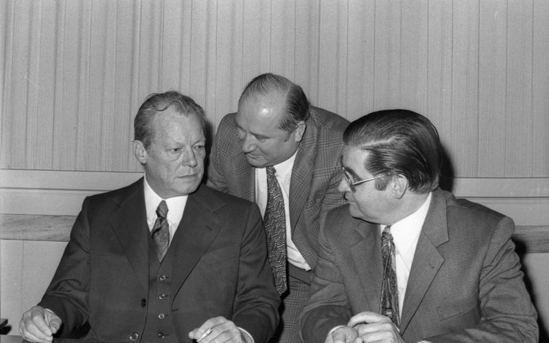 Berlin-West: Sitzung des SPD-Parteivorstandes im Rathaus Schöneberg